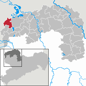 Neukyhna in Saxony - Landkreis Nordsachsen